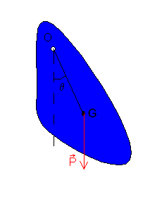 Image de physique Schéma Pendule pesant